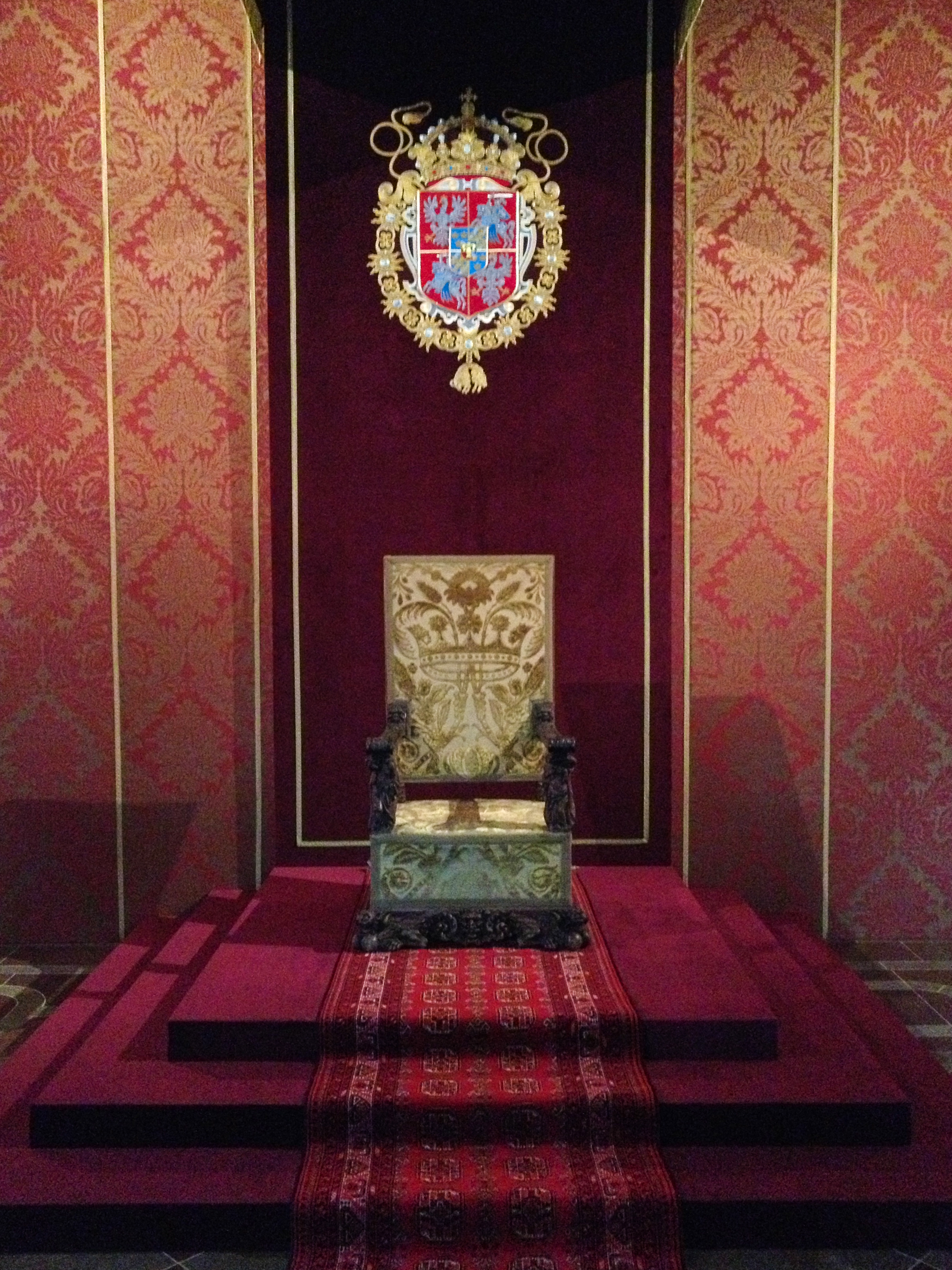 Valdovų rūmai